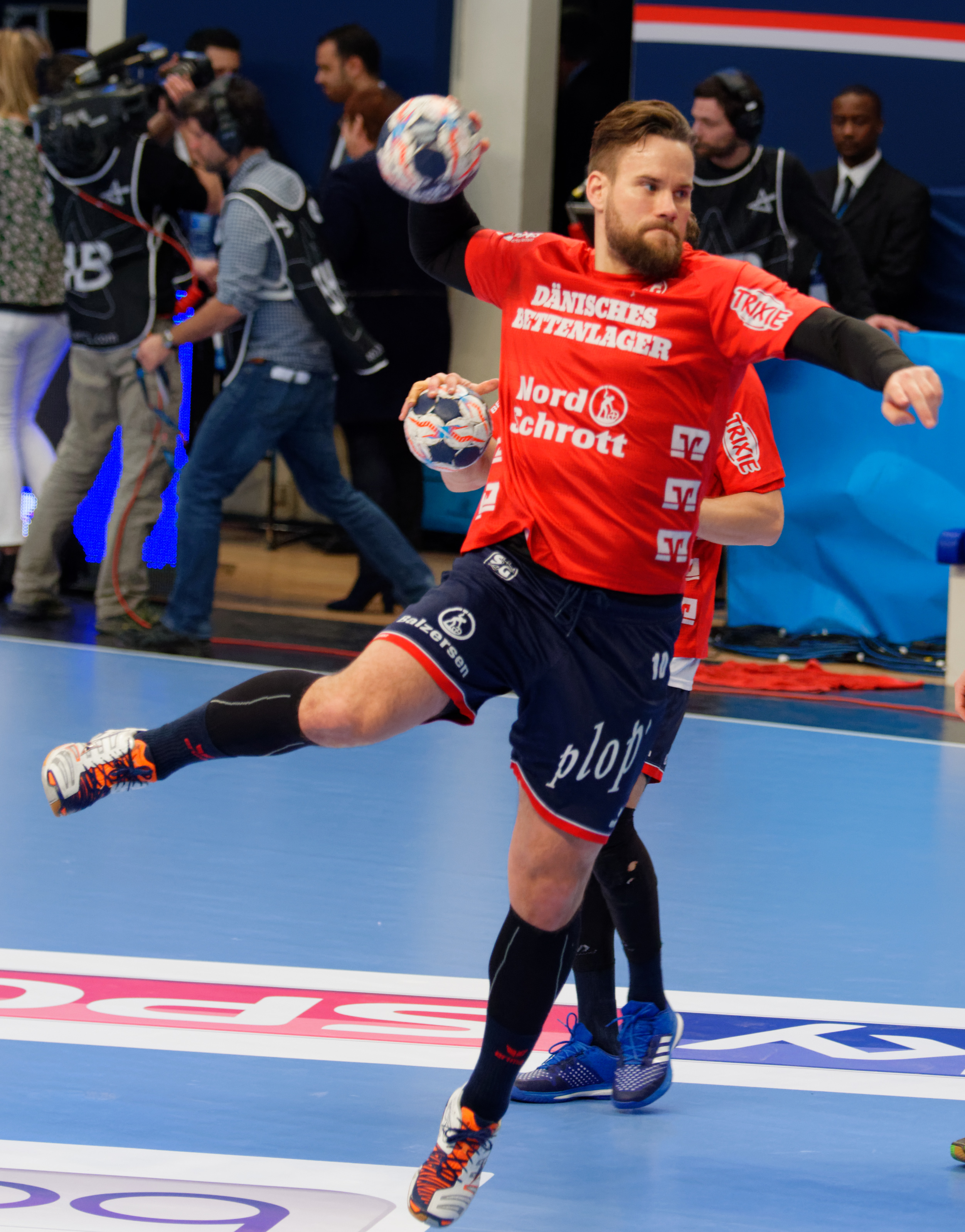 Rencontre de phase de groupe de la ligue des champions 2017/18 entre le PSG et SG Flensburg. A Coubertin, le 17 février 2018.